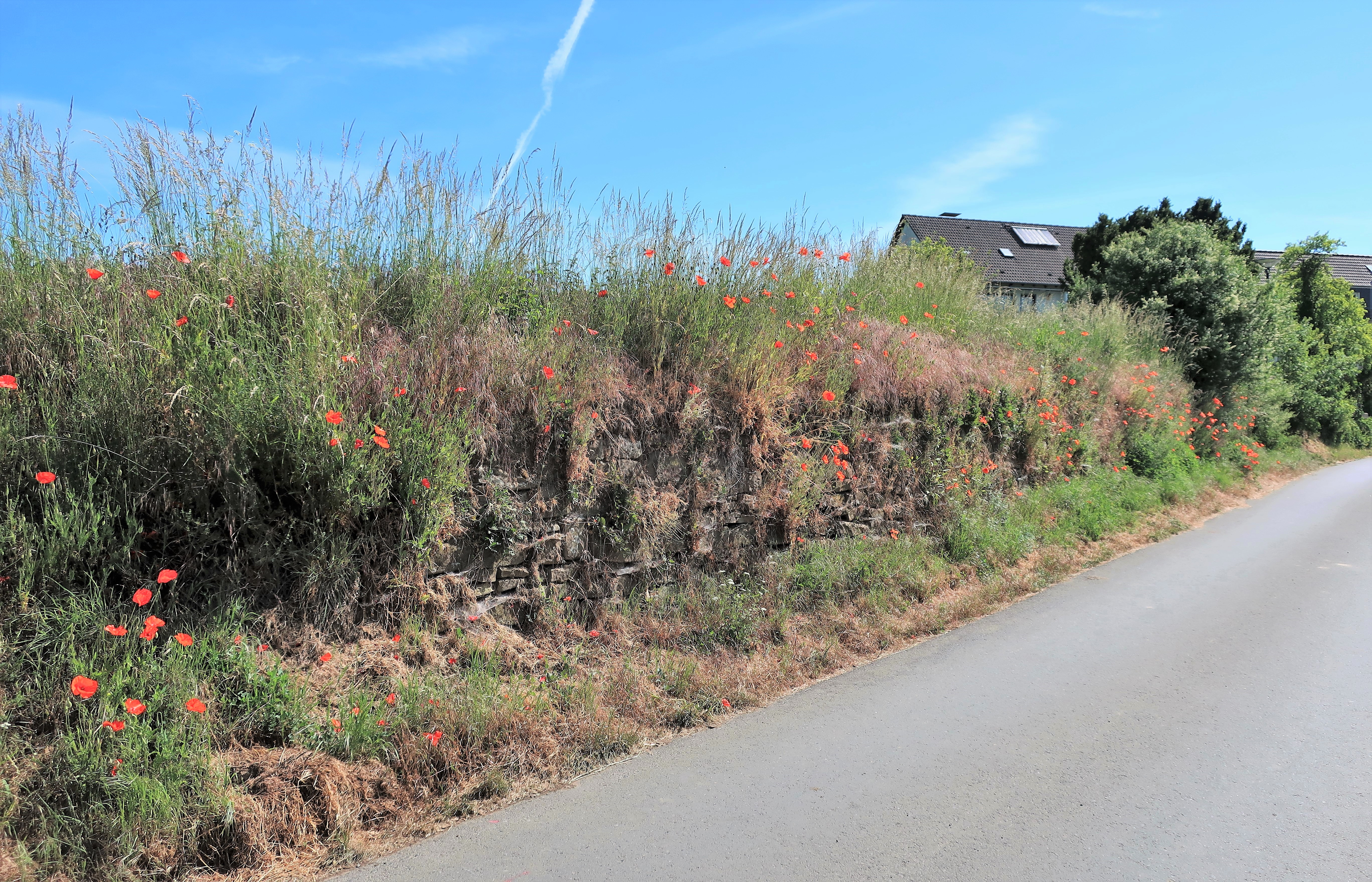 Geschützter Landschaftsbestandteil 1.4.2.16 „Trockenmauer Garenfelder Weg“ in Hagen-Berchum. Die ca. 35 m lange und 1,20 m hohe Trockenmauer erstreckt sich nördlich von Berchum entlang des Garenfelder Weges.